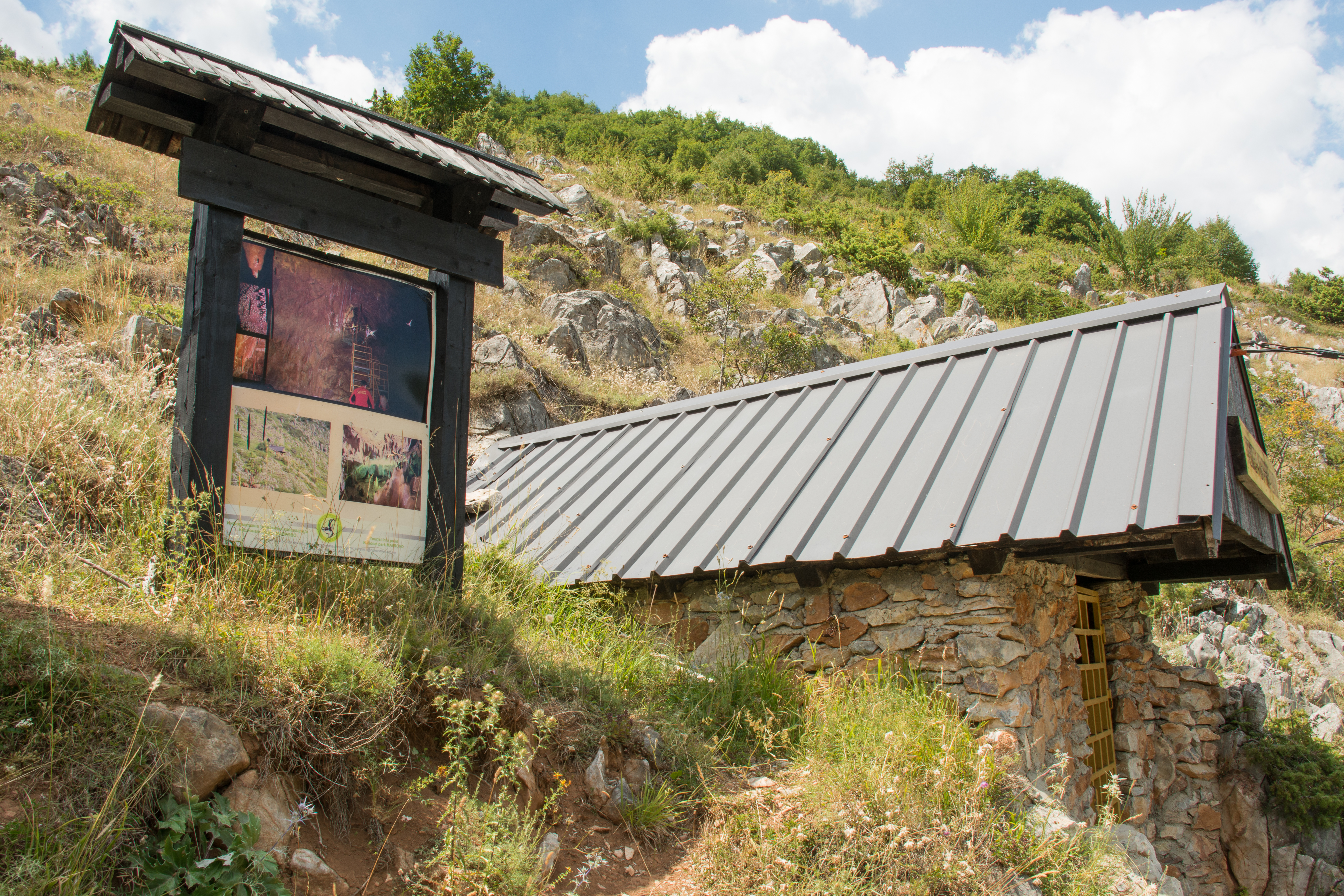 Влезна врата на пештерата и поставена табла со мапа, која ги објаснува пештерските украси и богатиот животински свет.